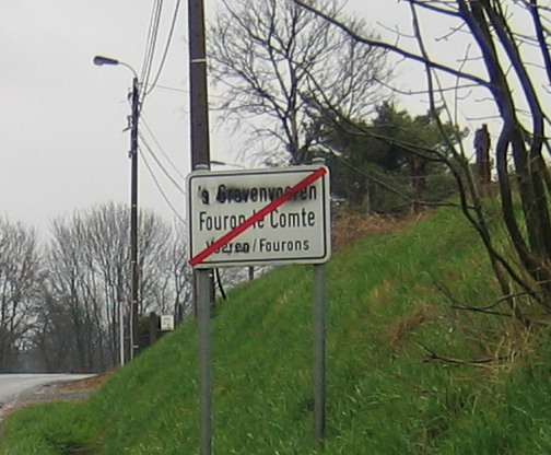 Plaatsnaambord aan de oostkantje van 's-Gravenvoeren, in de voerstreek in Vlaanderen